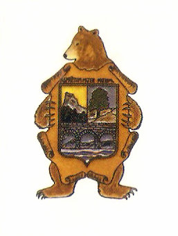 Escudo de Casas del Castañar